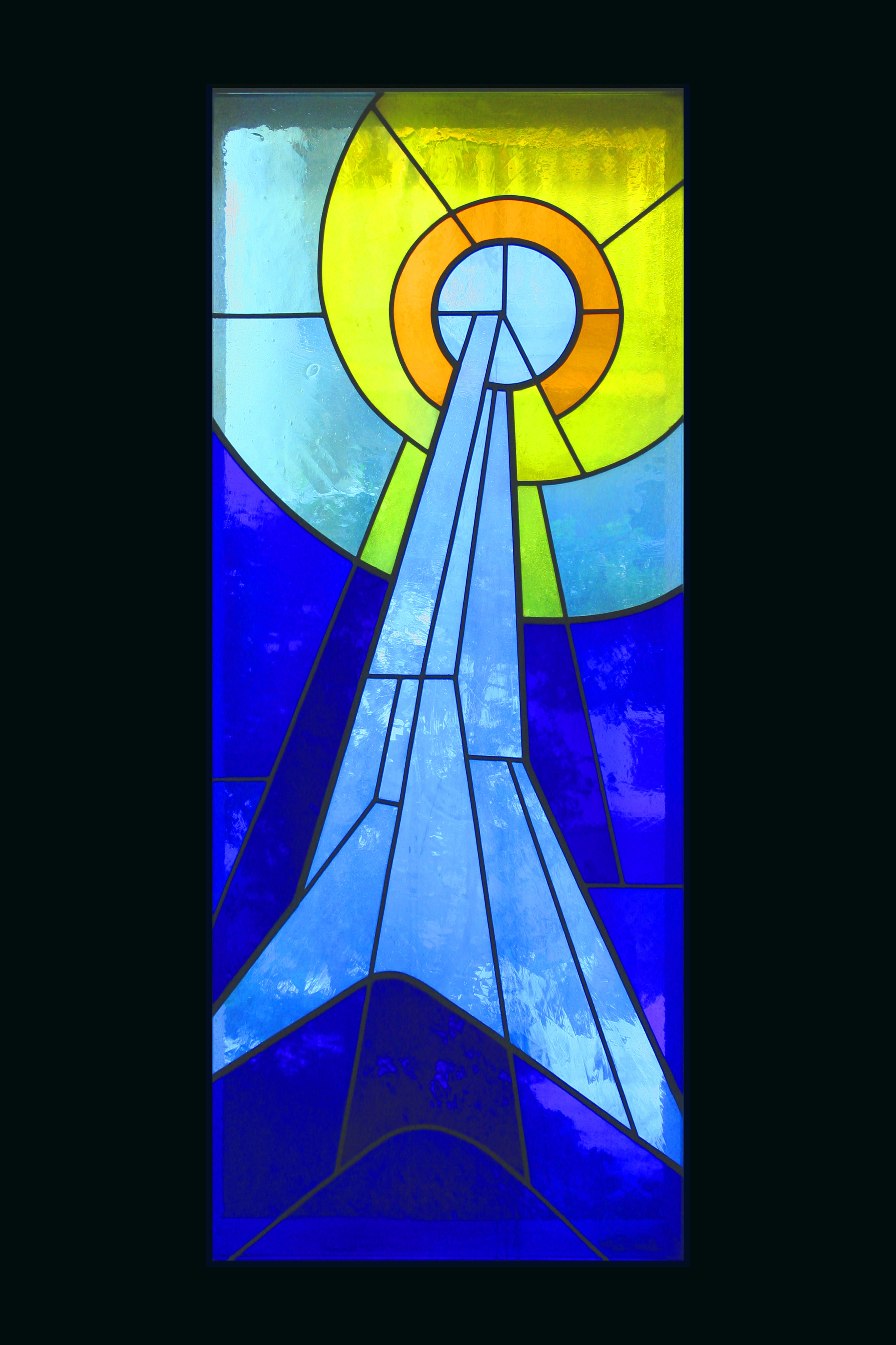 Römisch-katholische Kirche Bruder Klaus Zumikon, Glasfenster von Jean Bünter